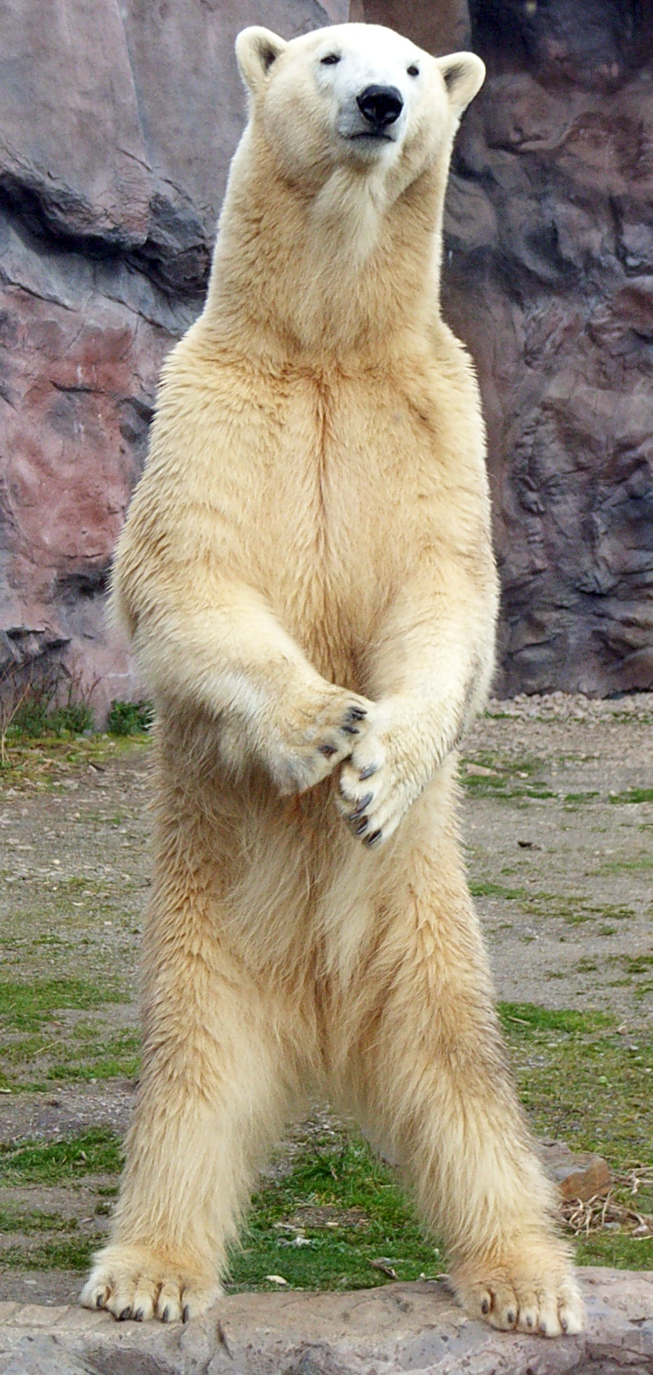 Eisbär in der Zoom Erlebniswelt Gelsenkirchen.